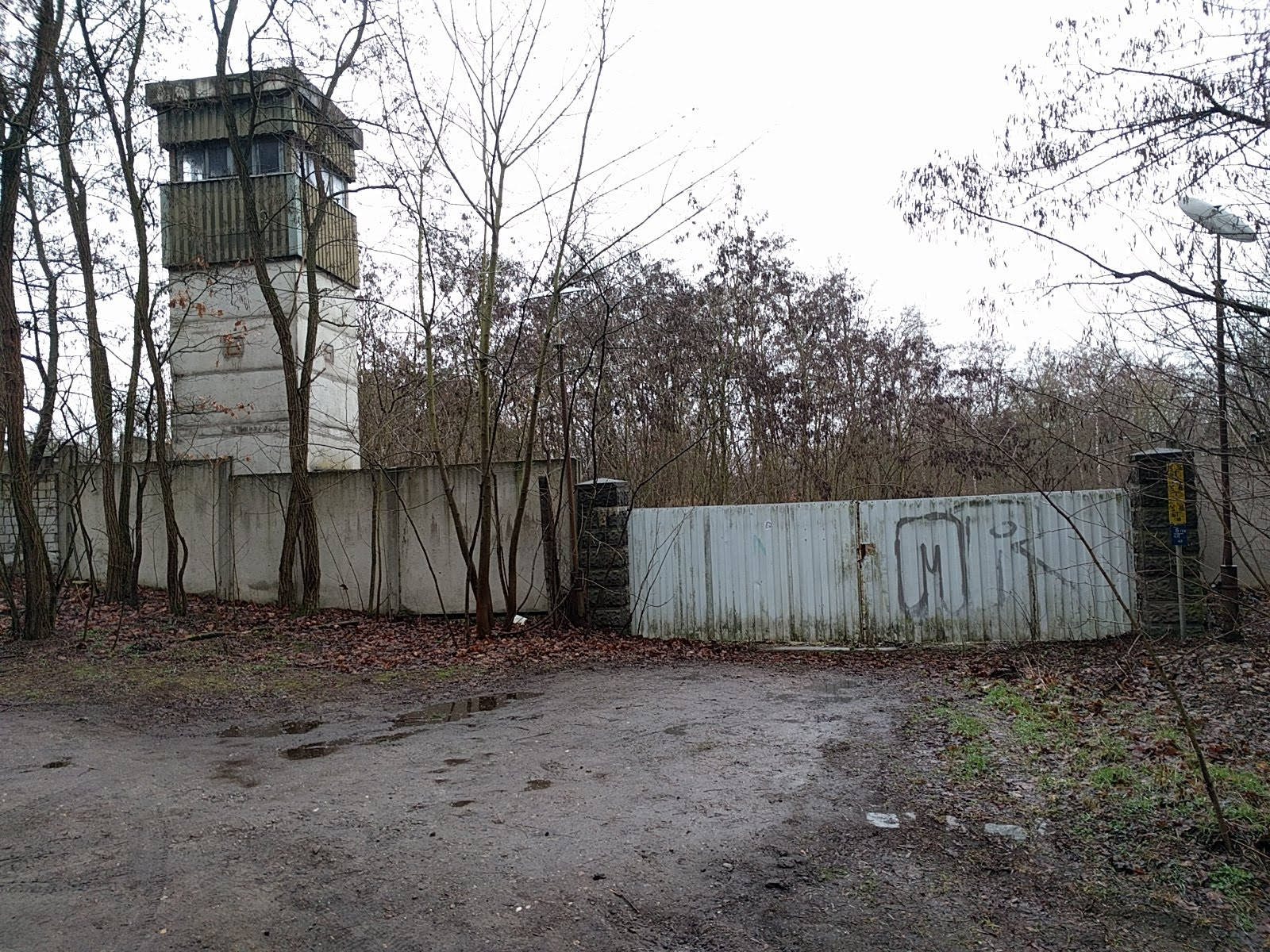 Letzter erhaltener Wachturm auf dem ehemaligen Gelände der Staatssicherheit (Stasi) der Deutschen Demokratischen Republik (DDR), erbaut vor 1989, Biesenthal, Prendener Weg.